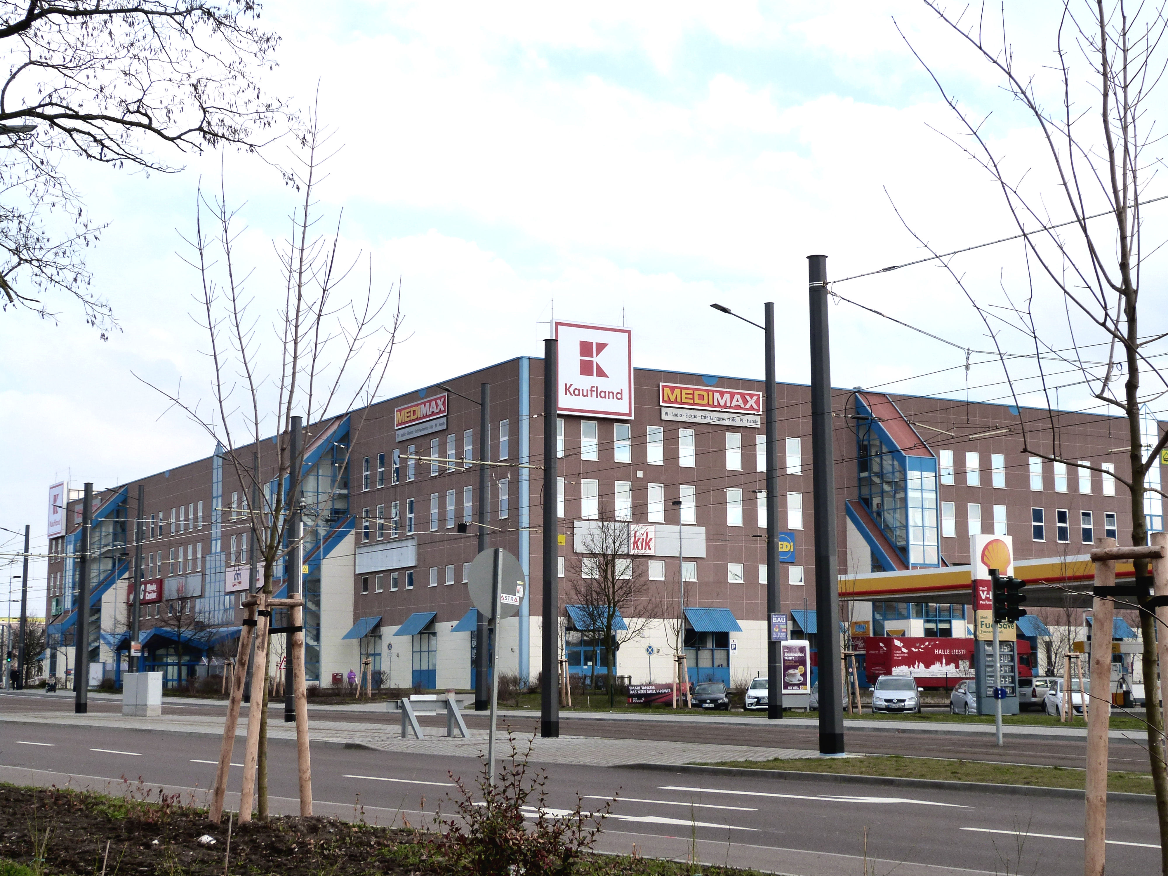 Kaufland Center, Südstadtring 90, Halle (Saale)